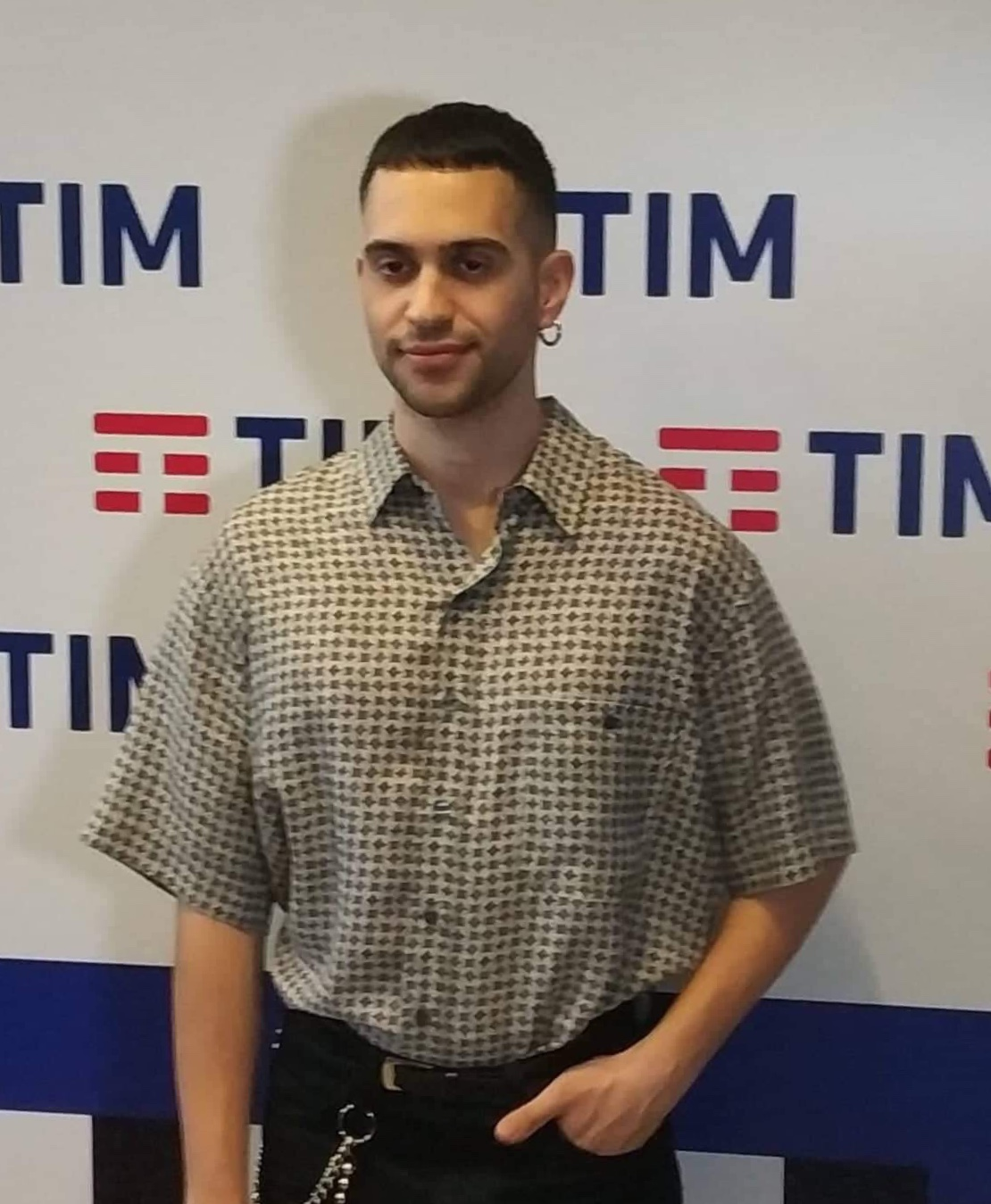 Italian singer Mahmood